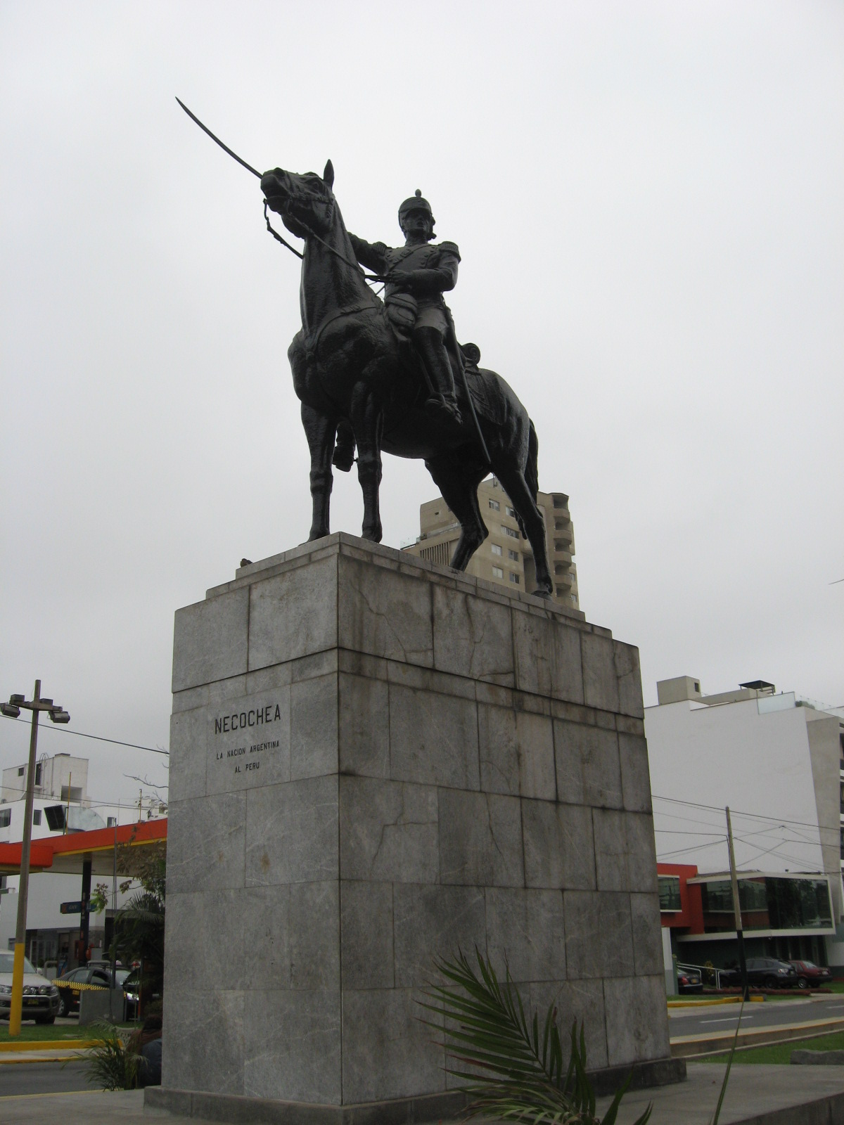 Estatua de Mariano Necochea en el distrito de San Isidro en Lima - Peru.